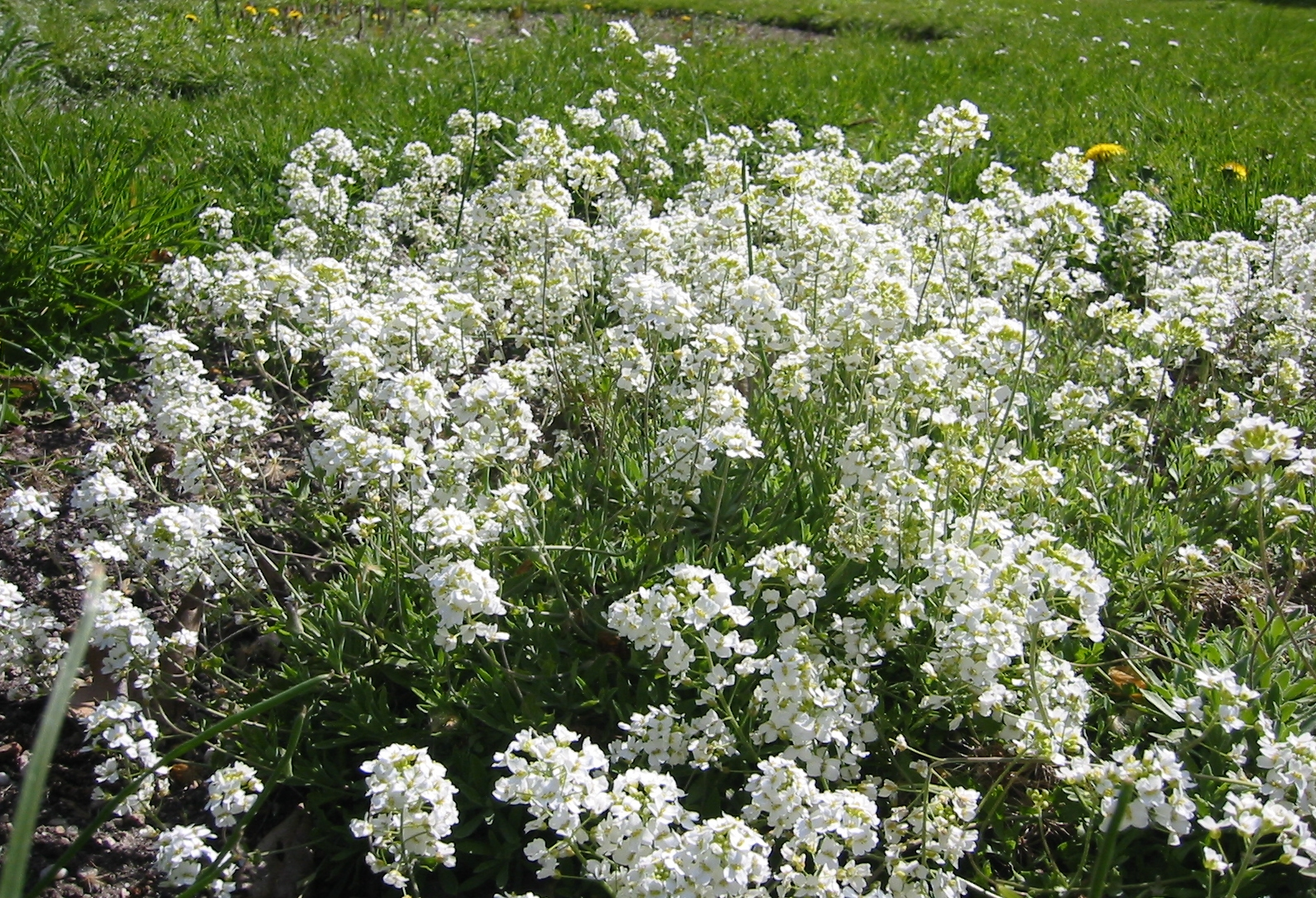 Schivereckia podolica; Botanic Garden, Vienna, Austria.